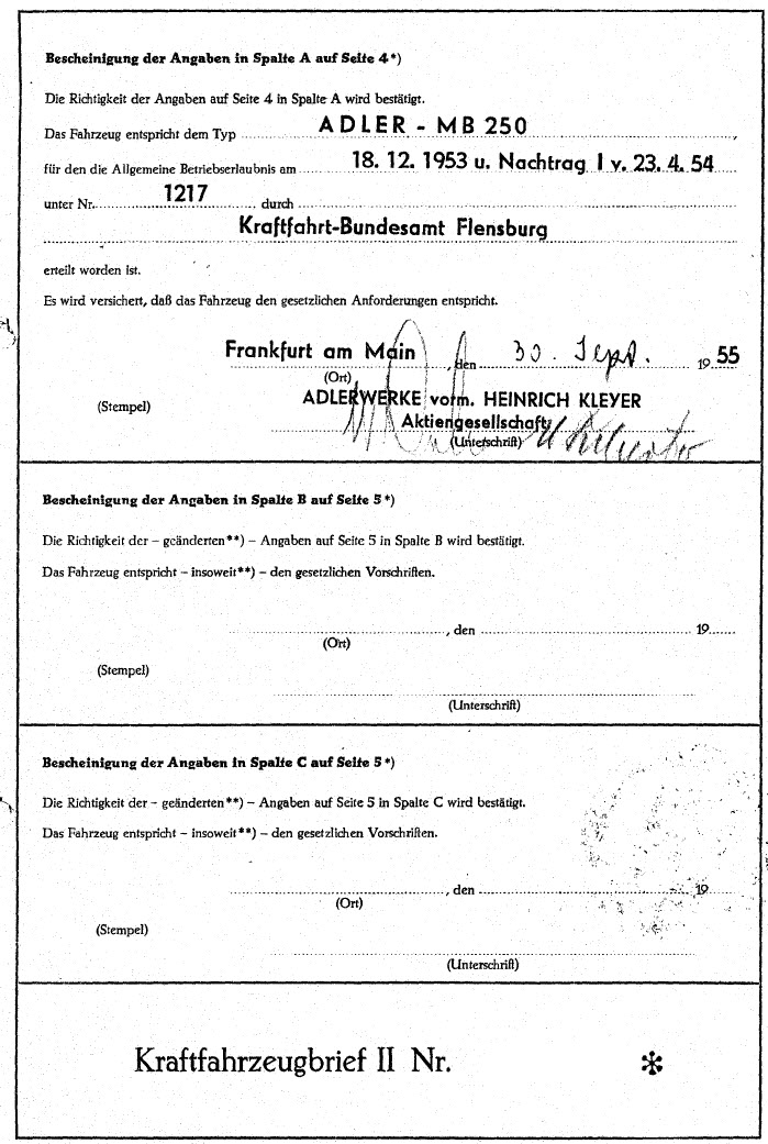 Fahrzeugbrief Adler MB 250 - Nummer gelöscht